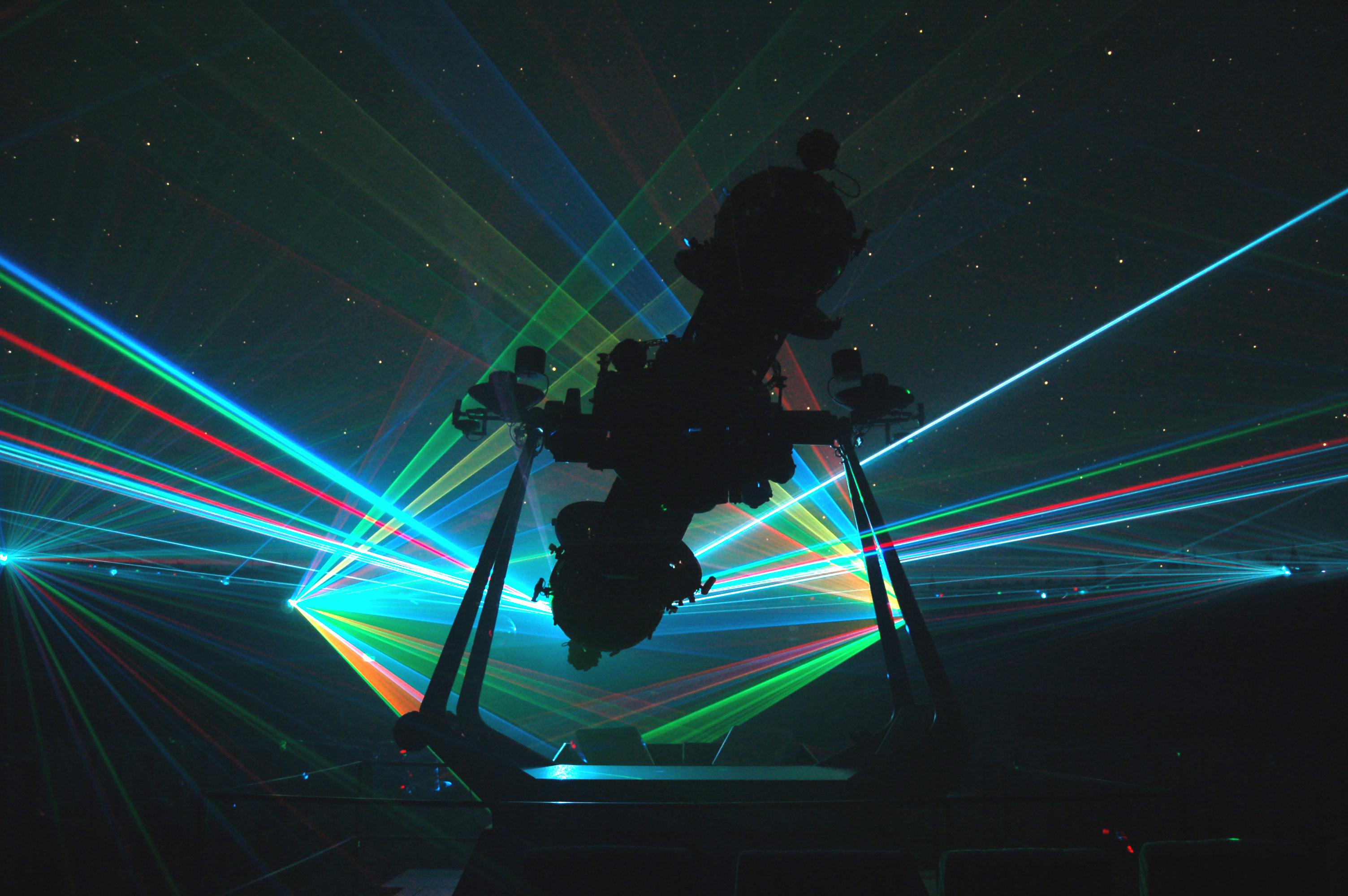 Das Bild zeigt den Planetariumsprojektor der Firma Zeiss, Modell V, während einer Lasershow.